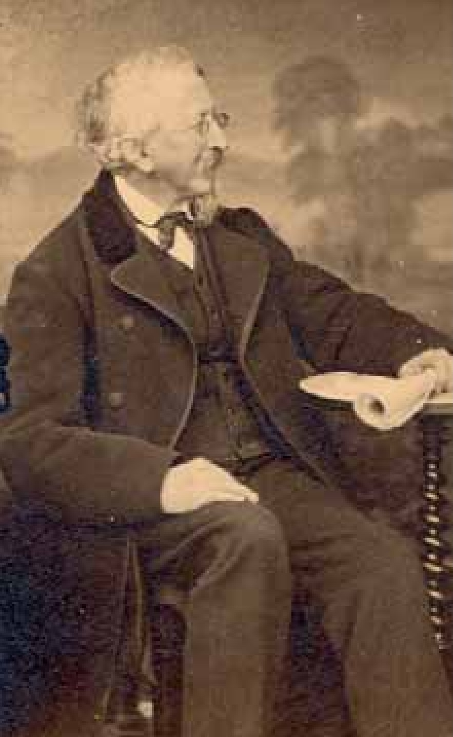 Alexander Kaufmann als fürstlicher Archivrat, um 1880. Vorlage: Landesarchiv StAW R NL 22 Nr. 7